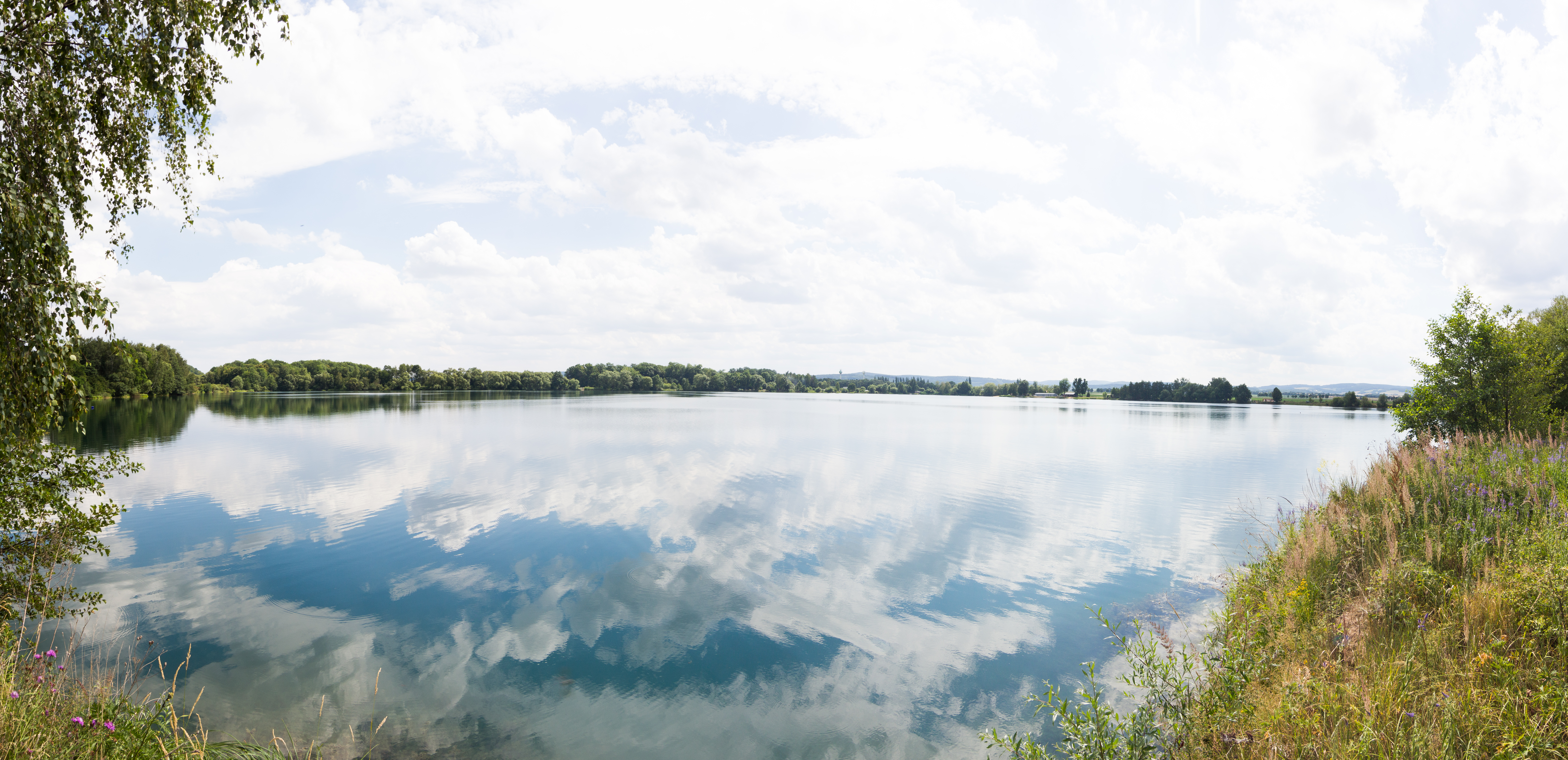 Moravičanské jezero